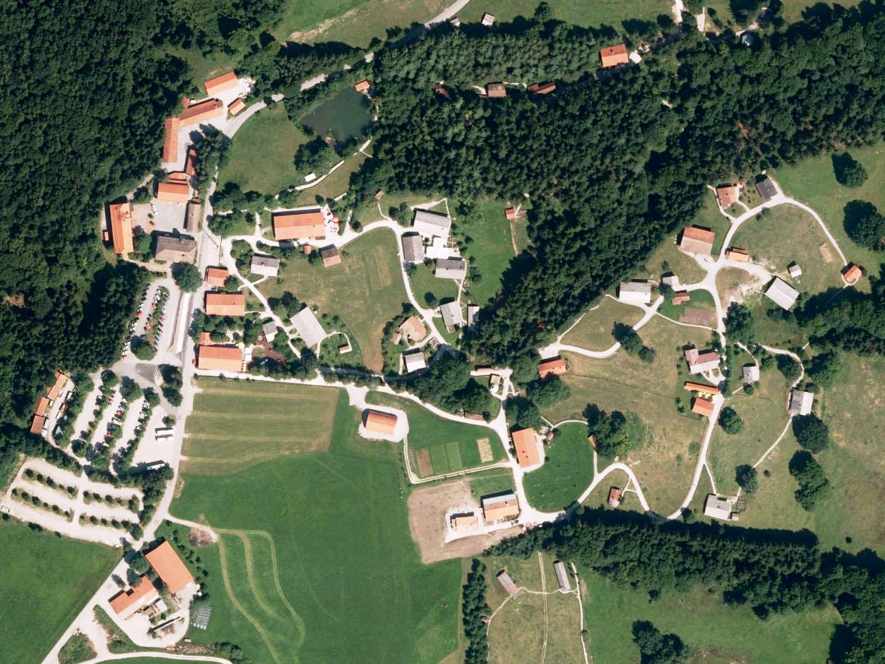 Luftaufnahme der Bayerischen Vermessungsverwaltung: Freilichtmuseum Glentleiten in Großweil, Landkreis Garmisch-Partenkirchen, Bayern.